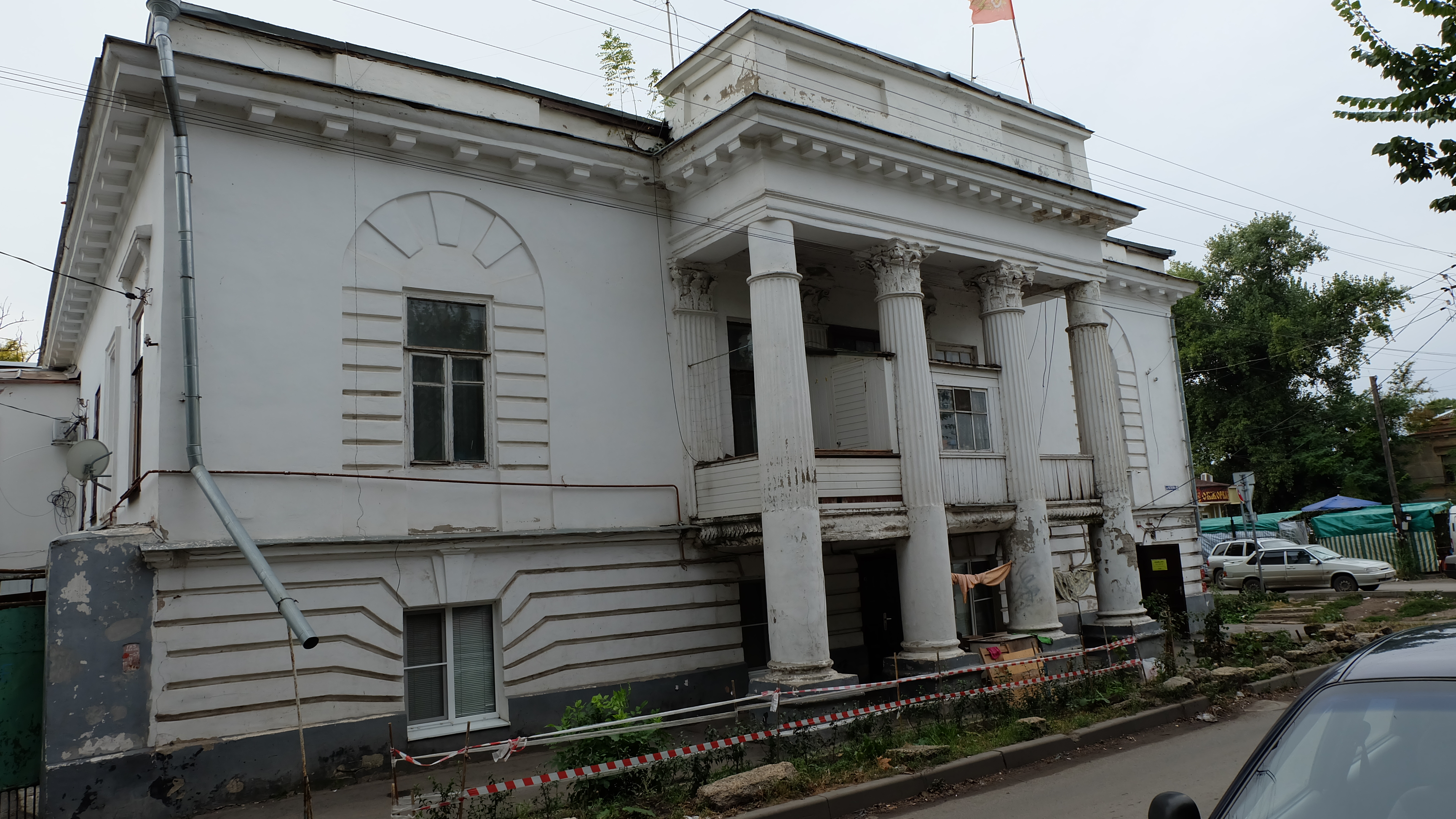 Жилой дом купца Кирсанова, комплекс застройки улицы: улица Чехова, 129, Таганрог, Ростовская область